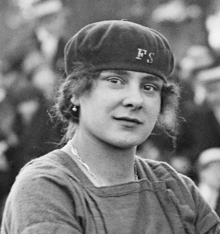 19 sept. 1920, kermesse de Chantilly ; Lucie Bréard.